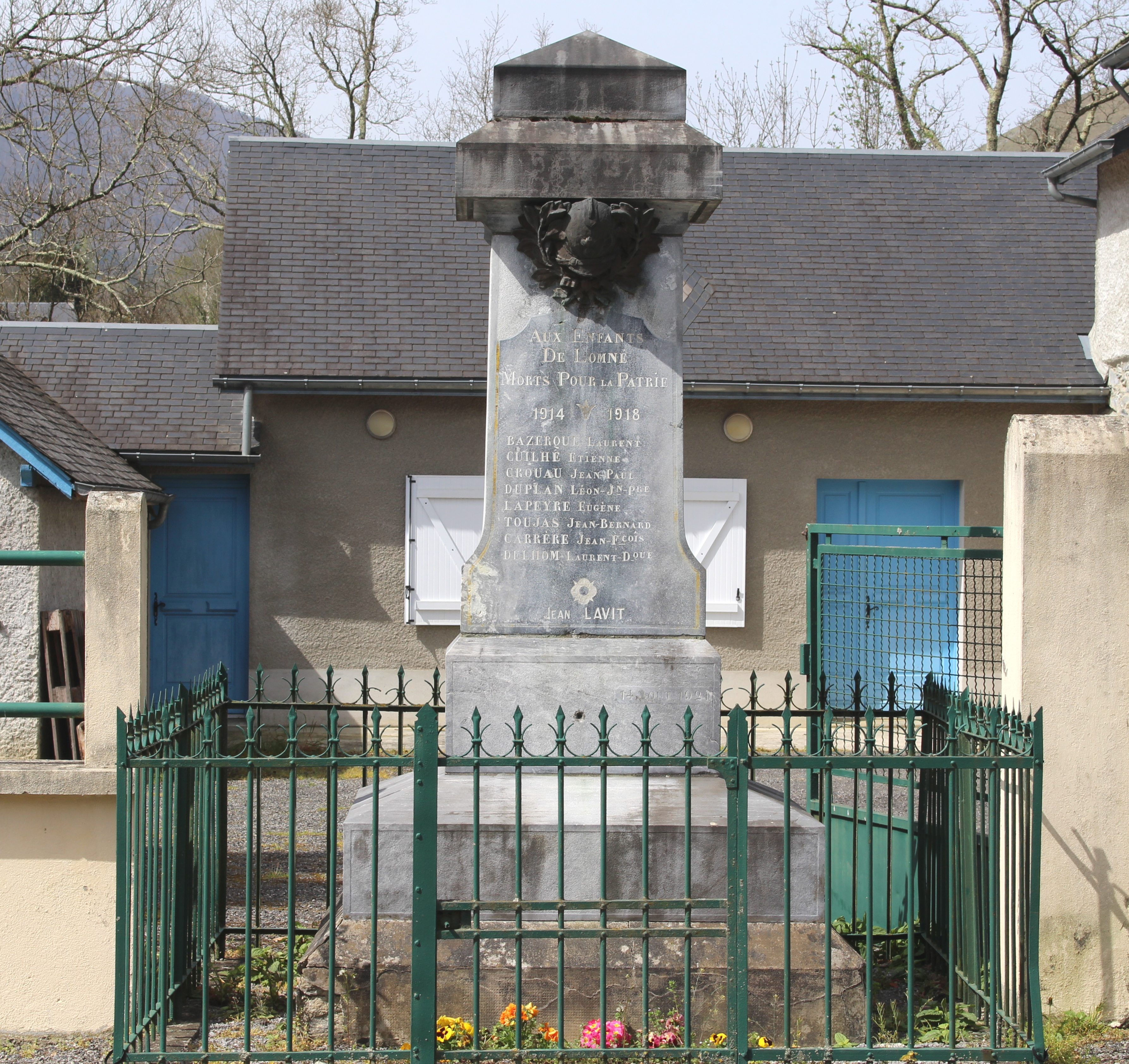 Monument aux morts de Lomné (Hautes-Pyrénées)